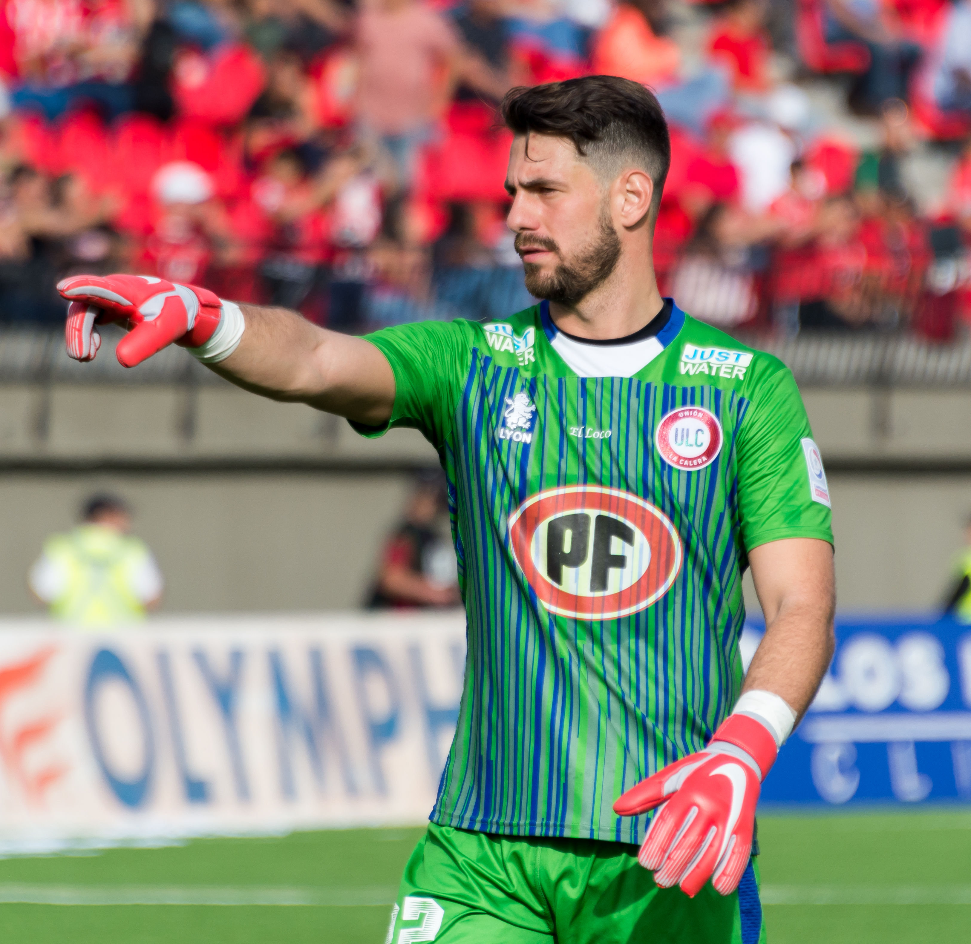 Augusto Batalla, Unión La Calera v Colo-Colo, Estadio Municipal Nicolás Chahúan Nazar, La Calera, Región de Valparaíso, Chile.